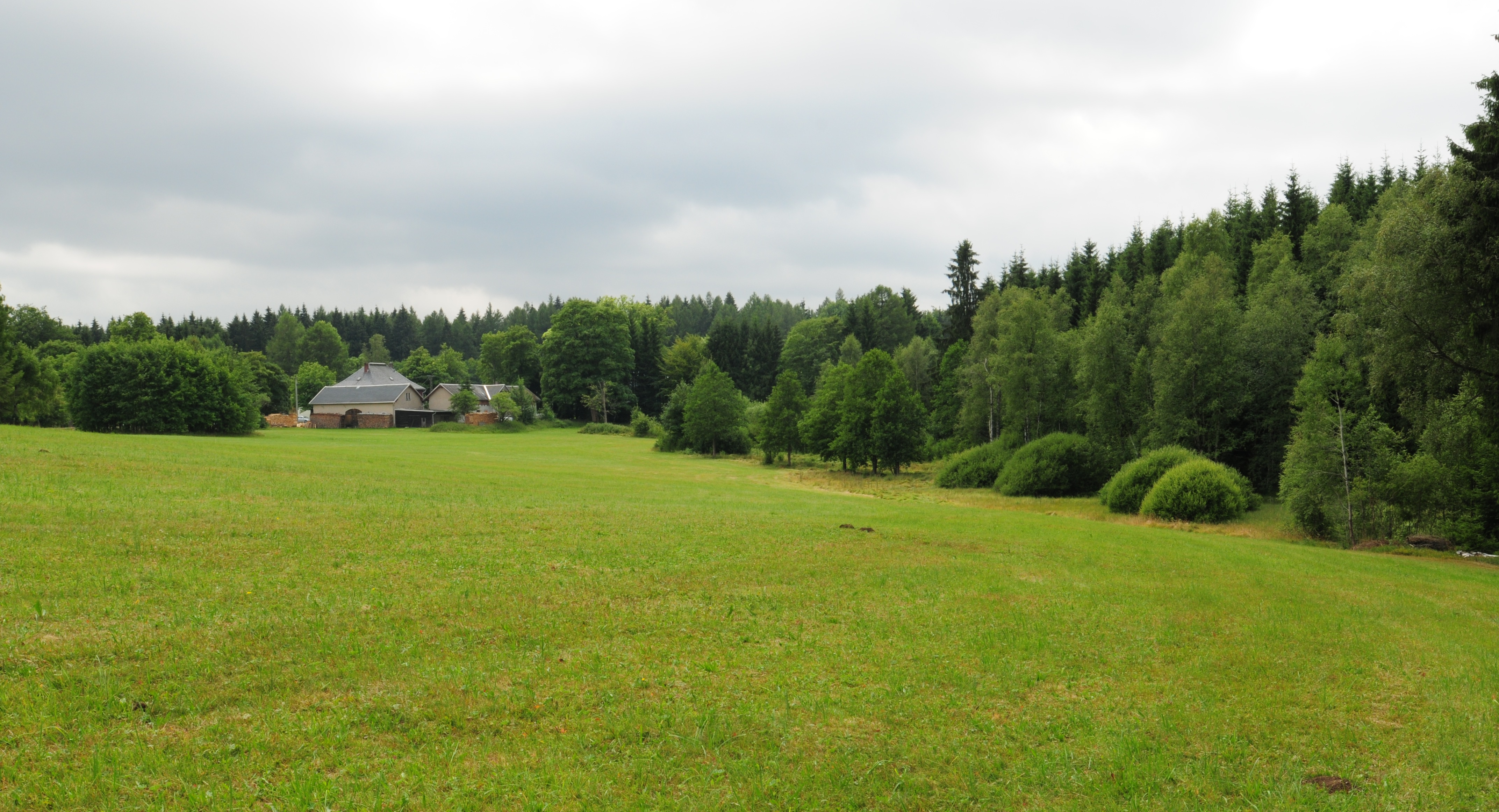 Kottenheide, Blick auf einen Teil des Walddorfes (Stadt Schöneck/Vogtl., Vogtlandkreis, Freistaat Sachsen)